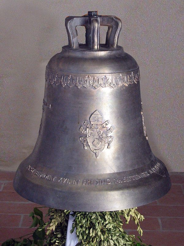 „Friedrichsglocke“ (Gegossen anlässlich des Besuchs Papst Benedikts XVI. in Freising, 14. September 2006, sie erhält zu Ehren von Kardinal Friedrich Wetter ab dem 13.10.2007 den Namen "Friedrichsglocke")